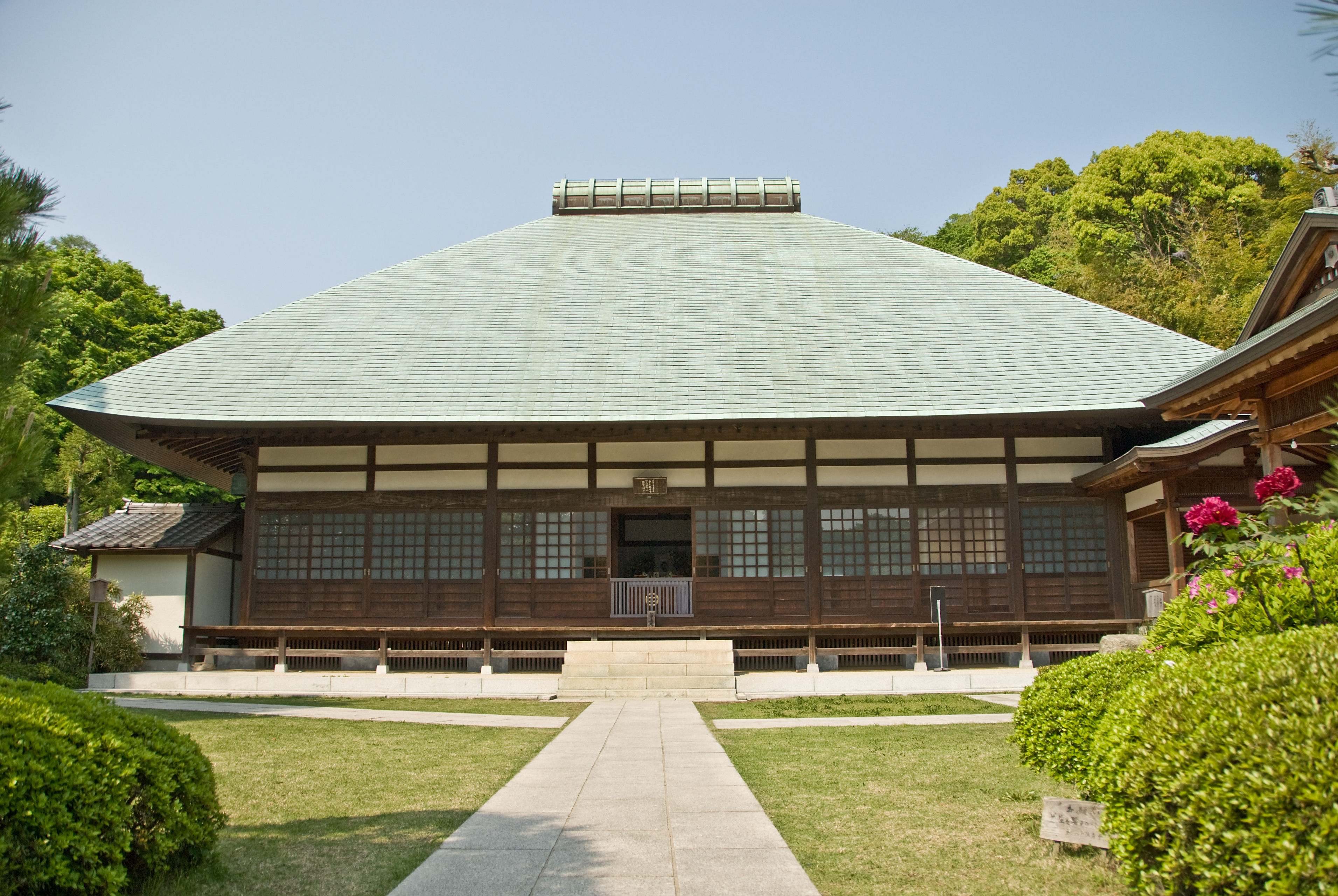 Jomyo-ji, Kamakura. The Main Hall